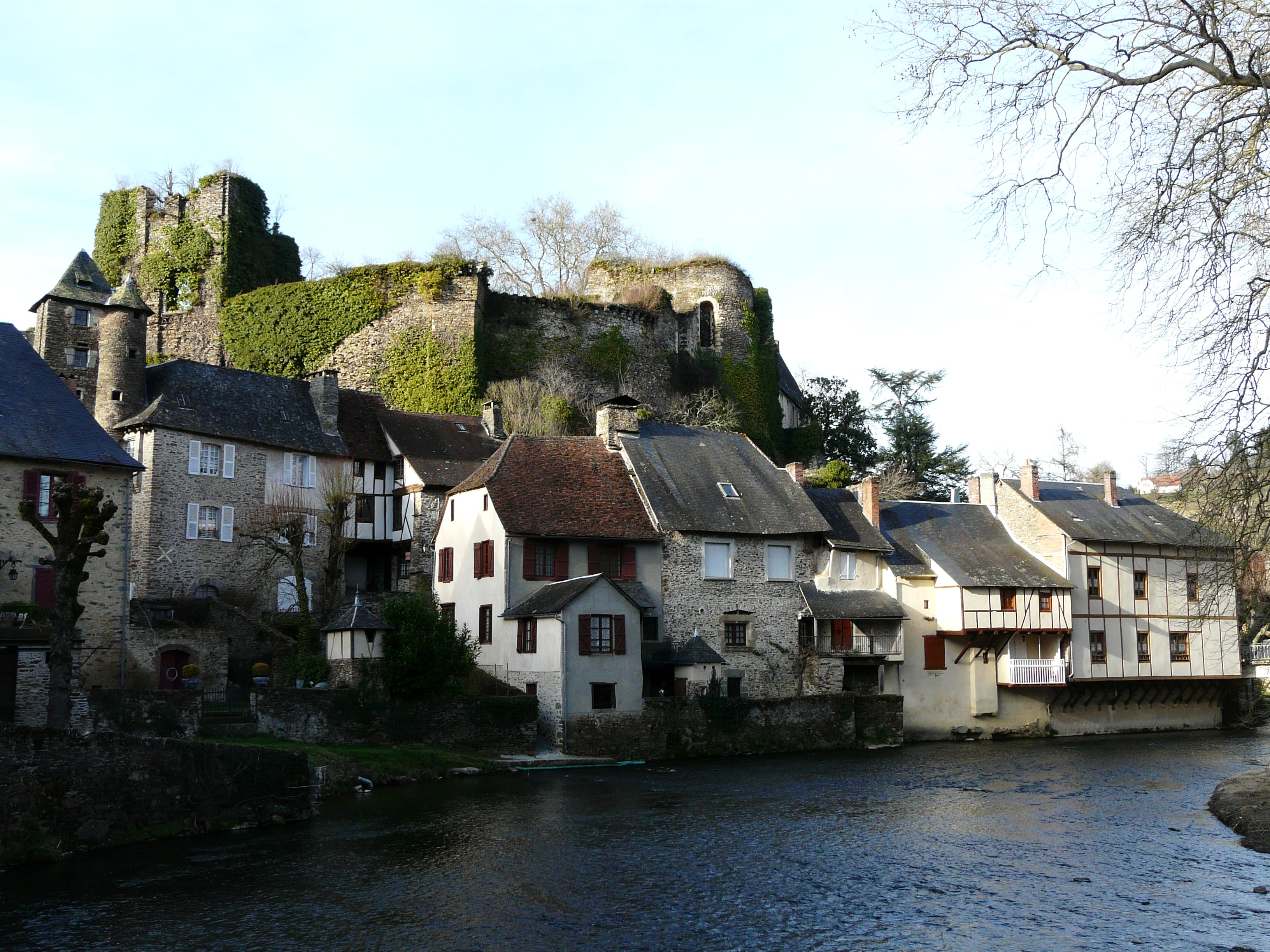 L'Auvézère au pied du bourg de Ségur-le-Château, Corrèze, France. Vue prise depuis la place du foirail.